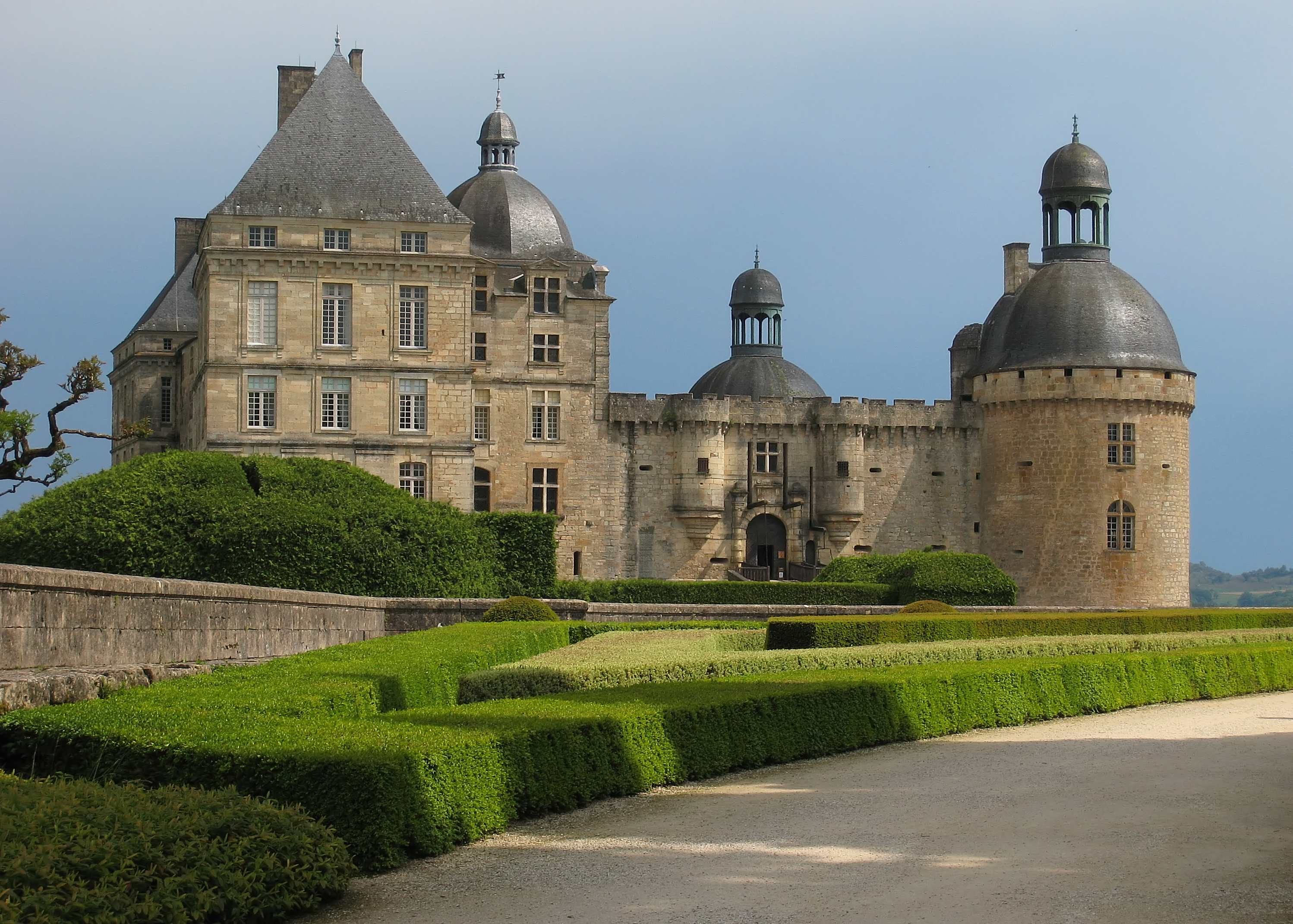 Château d'Hautefort, Département Dordogne/France